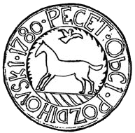 Pečeť obce Pozděchov (okres Vsetín)